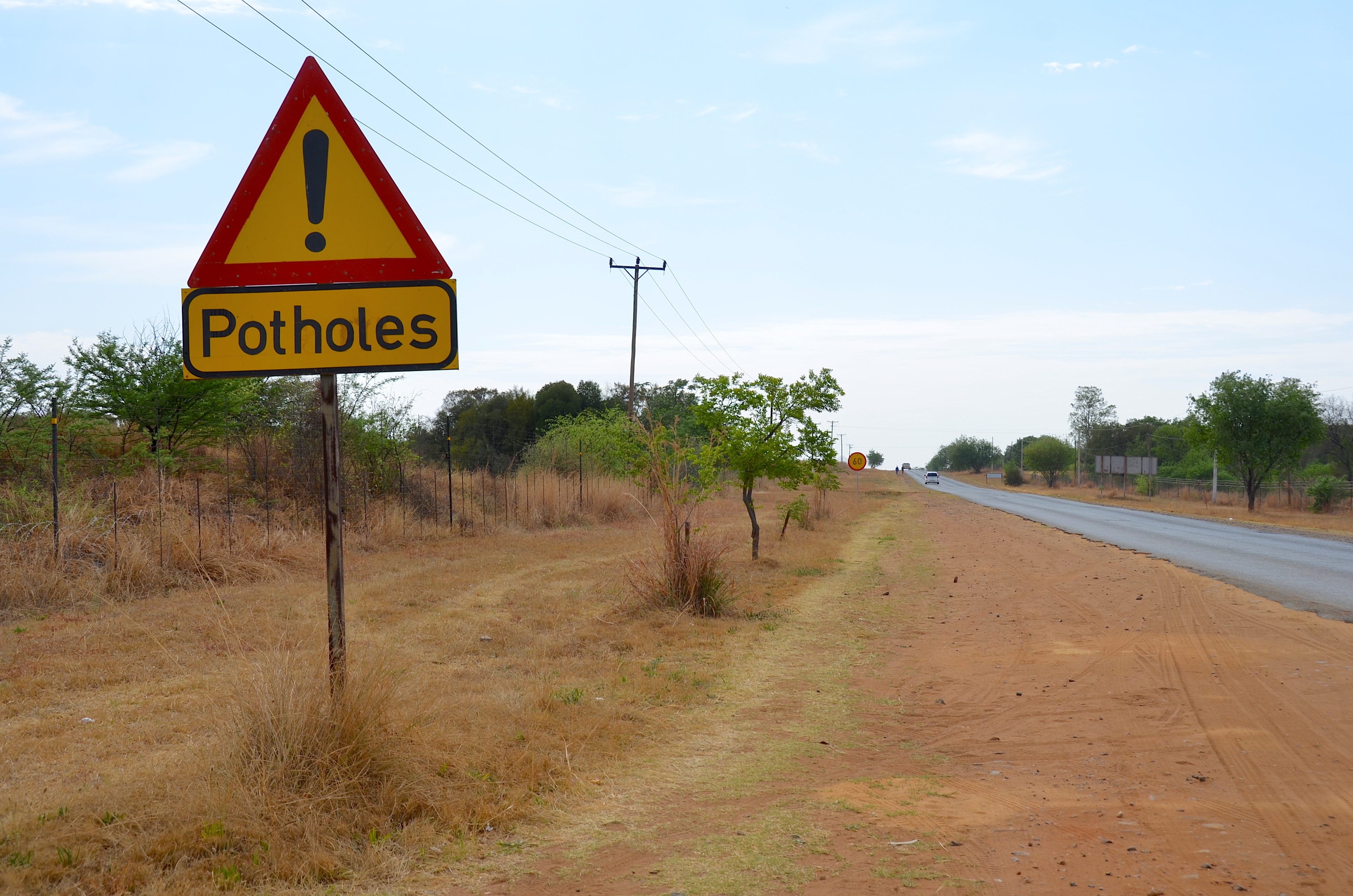 Schlagloch-Warnschild an der R512, Nordwest Provinz in Südafrika